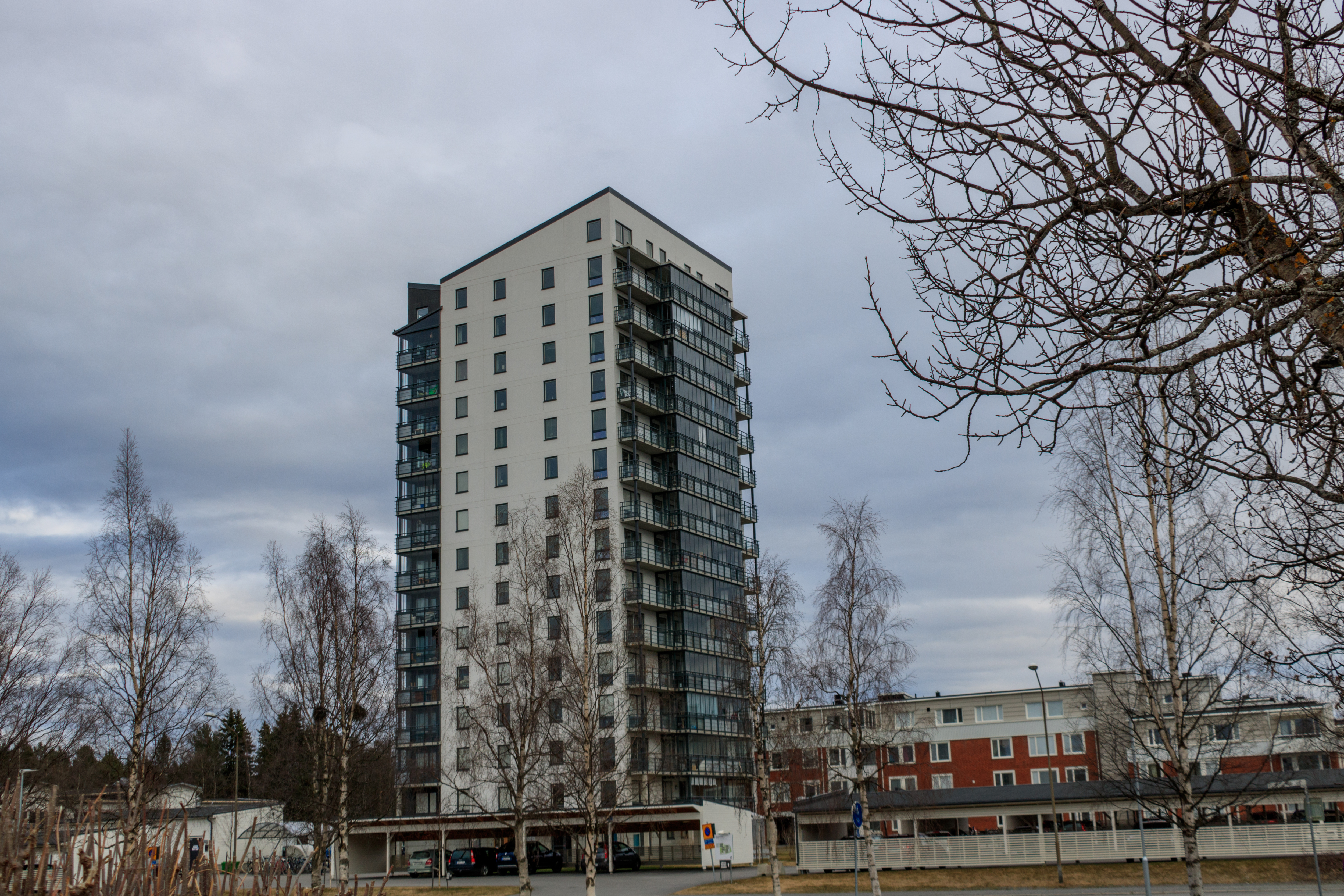 Fagerskrapan i Östersund